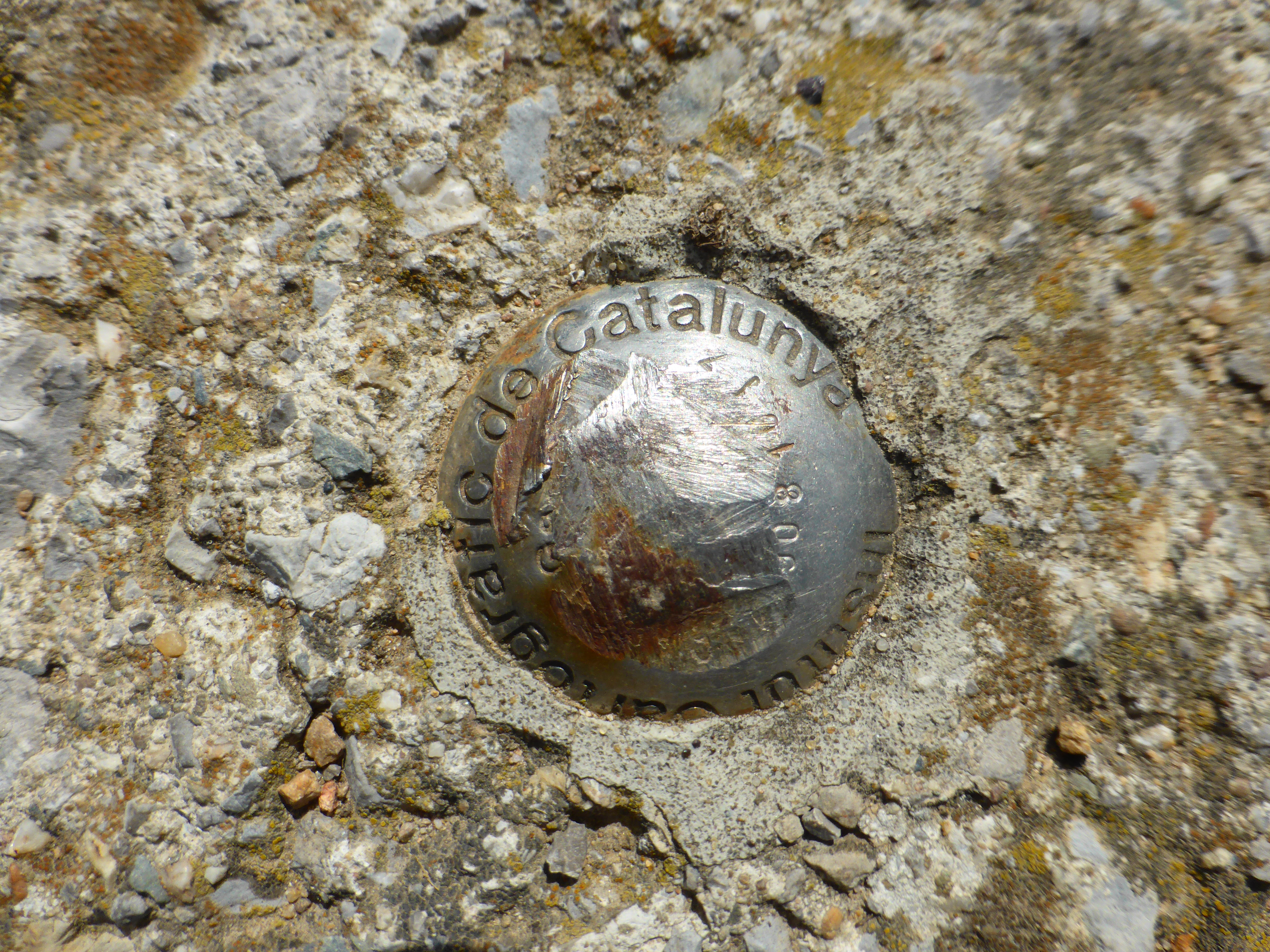 Senyal geodèsic 289081017 - Ribes Altes - Cementiri